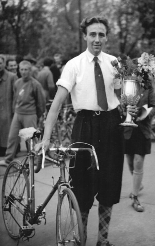 Friedensfahrt, Olsen Illus V Hein-Nb. 22.5.1951 Internationale Friedensfahrt Prag-Warszawa 1951 Das Ziel der Friedensfahrt lag im Polnischen Armeestadion in Warszawa, wo 50.000 Menschen die Friedensfahrer begeistert empfingen. Die Siegerehrung fand in Anwesenheit von Ministerpräsident Joseph Cyrankiewicz auf dem Kreuzplatz statt. UBz: Der Däne Olsen, Sieger in der Einzelwertung. Leihweise Illus Berlin WS